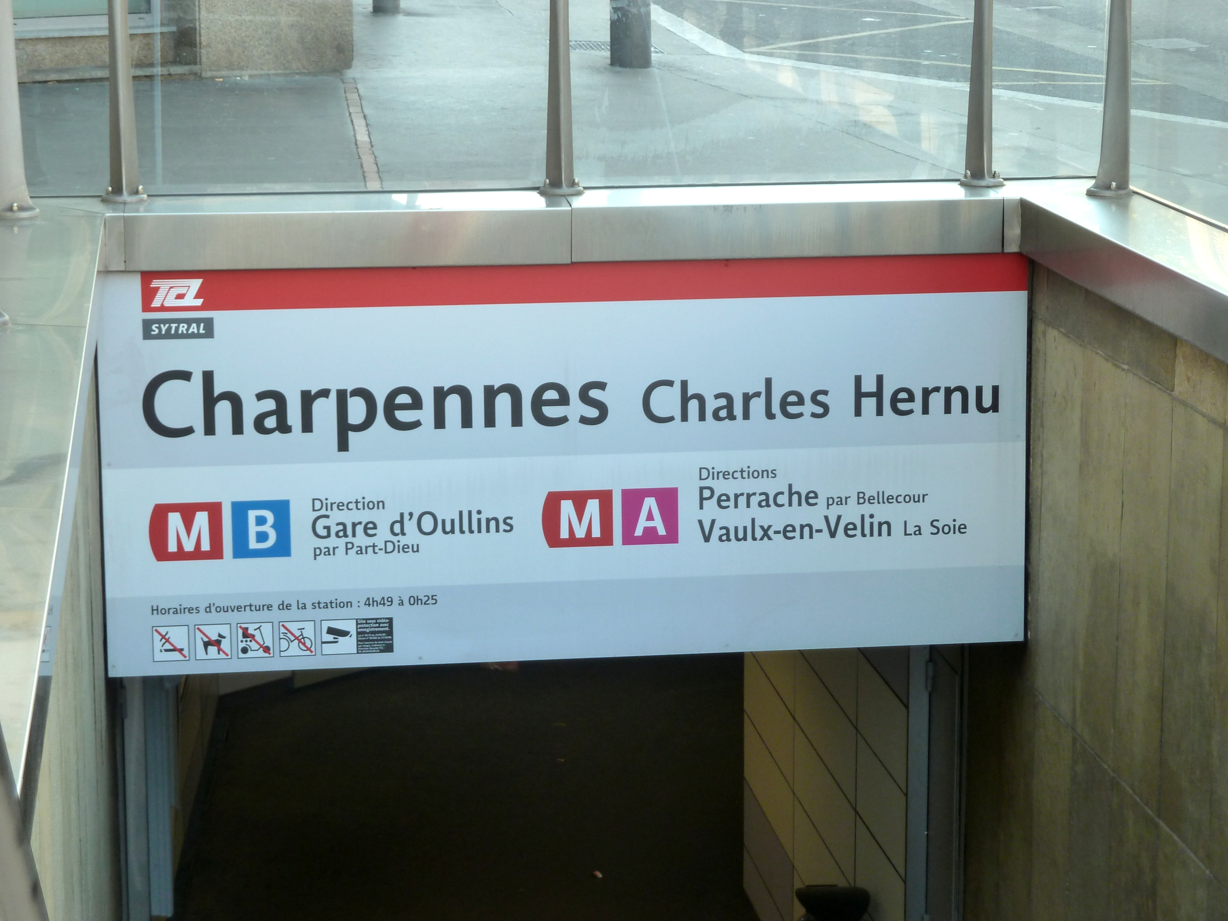 Entrée du métro Charpennes Charles Hernu sur le réseau TCL à Lyon.